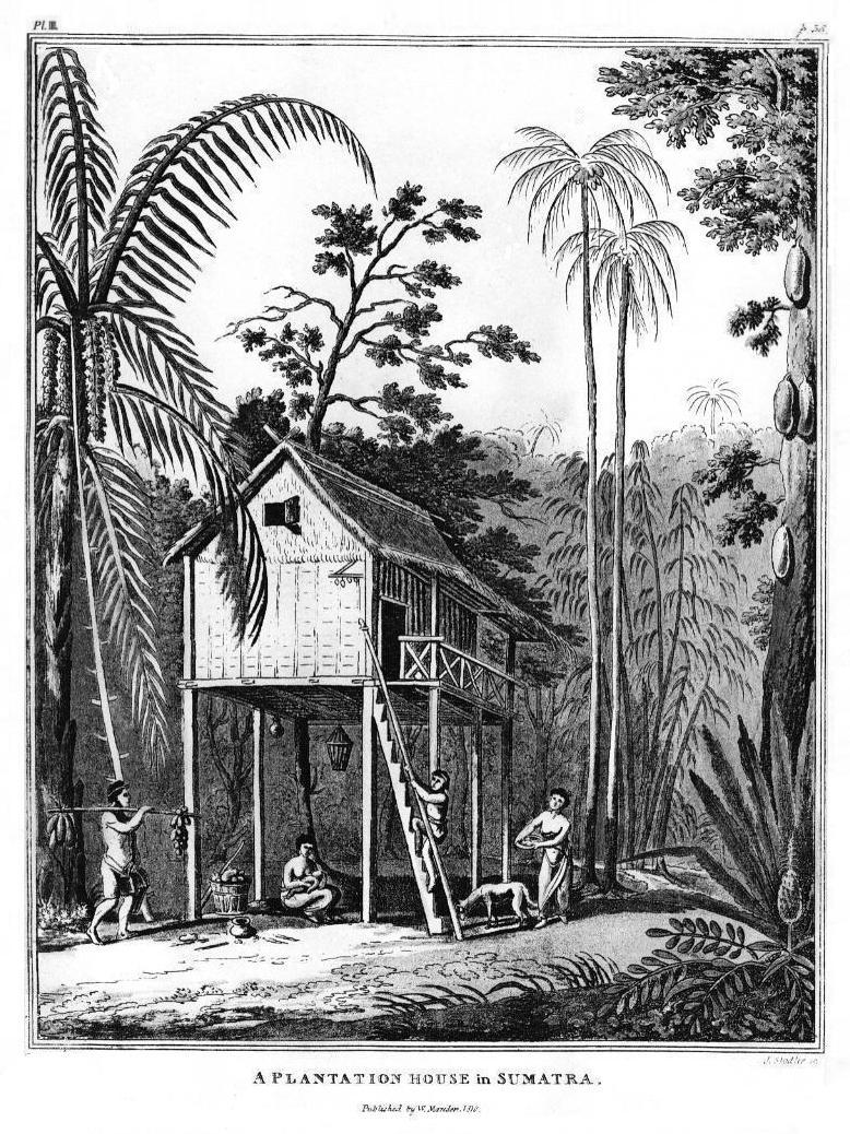 Ein Plantagenhaus in Sumatra